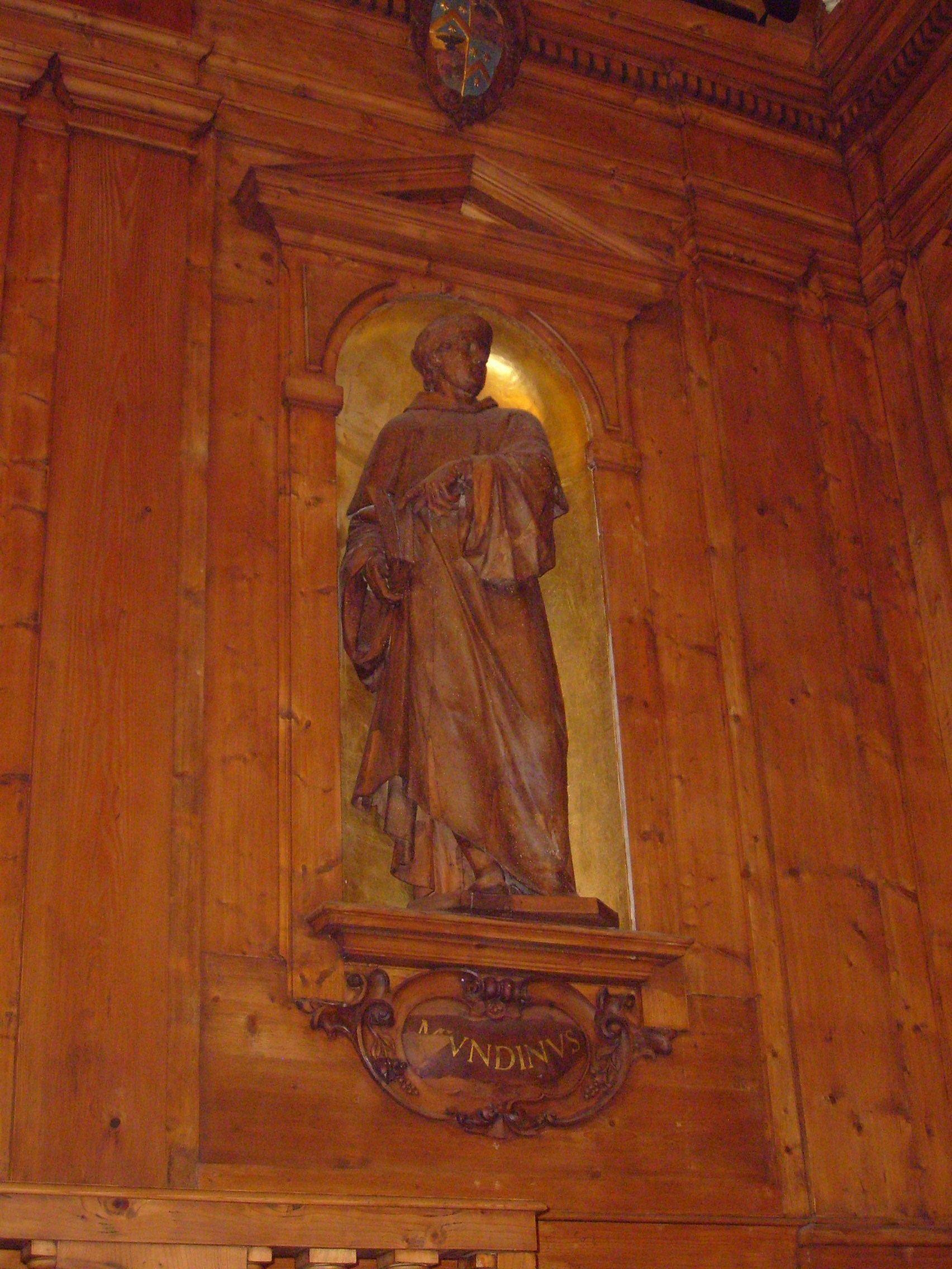 Anatomical theatre (the statue of Mondino de Liuzzi), Palazzo dell’Archiginnasio, Bologna, Italy